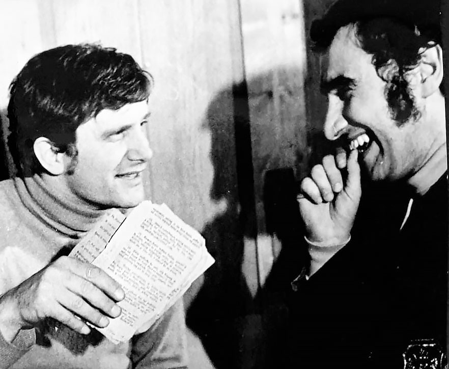 Jiří Suchý, herec a zakladatel divadla Semafor. A s ním usmívající se Ivan Soeldner, autor námětu, scénáře a režisér televizního seriálu o historii populární hudby u nás, s názvem Grandsupertingltangl.